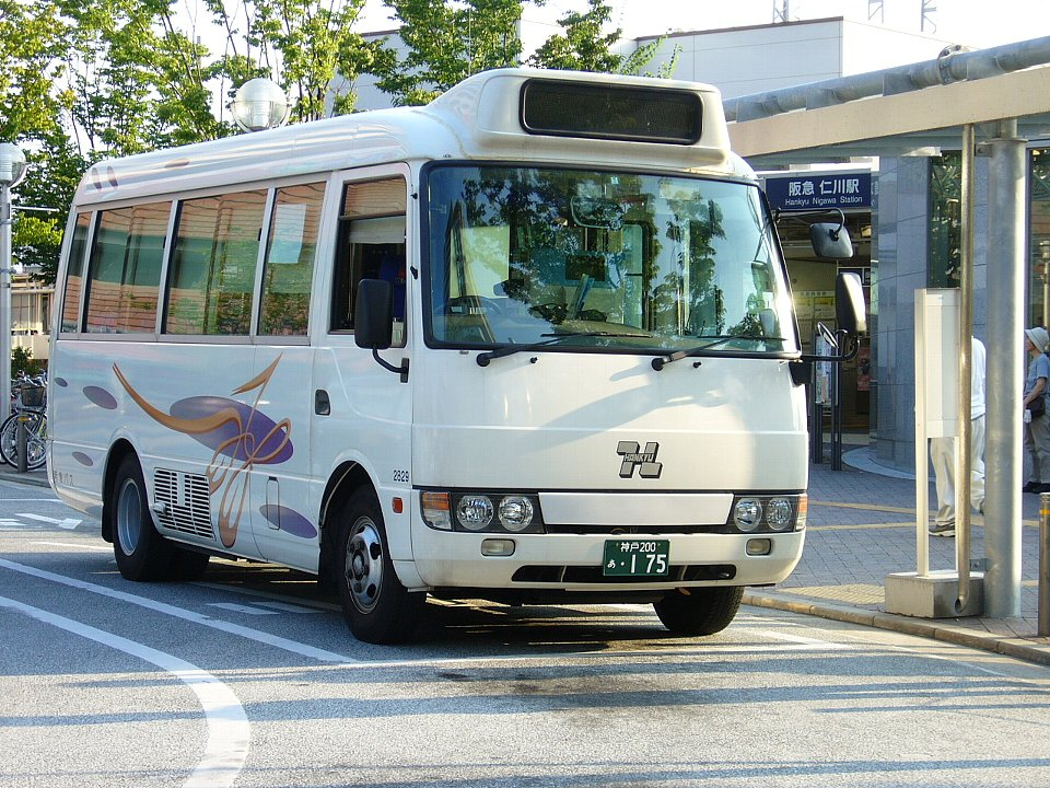 阪急バス（仁川高丸循環） 仁川駅東口にて